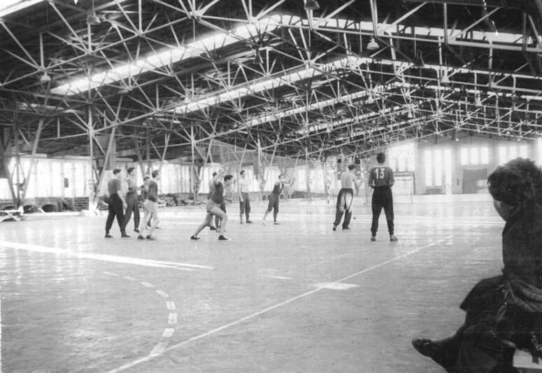 Rostock, Marienehe, Sporthalle, Handballtraining Zentralbild Wittig Rostocker Sporthalle für Hallenhandball-Weltmeisterschaft gerüstet Im Frühjahr 1958 finden in der DDR die Hallen-Handball-Weltmeisterschaften statt. Während die Endrundenspiele in Berlin ausgetragen werden, gibt es in einigen Städten unserer Republik interessante Vorrundenkämpfe. Einige Spiele werden dabei auch in Rostock stattfinden. Die Sporthalle der Werft- und Hafenstadt Rostock im Ortsteil Marienehe wurde mit einem Kostenaufwand vom 155.000 Mark renoviert und umgebaut. 2 070 Quadratmeter Bodenfläche der Halle wurden mit einem Spezialfußbodenbelag versehen. In der Sporthalle wurden neue Duschräume, Umkleidekabinen und ein Kulturraum gebaut. UBz: Ein Blick in die Rostocker Halle während des Trainings der Handball-Oberligasieben Empor Rostocks.